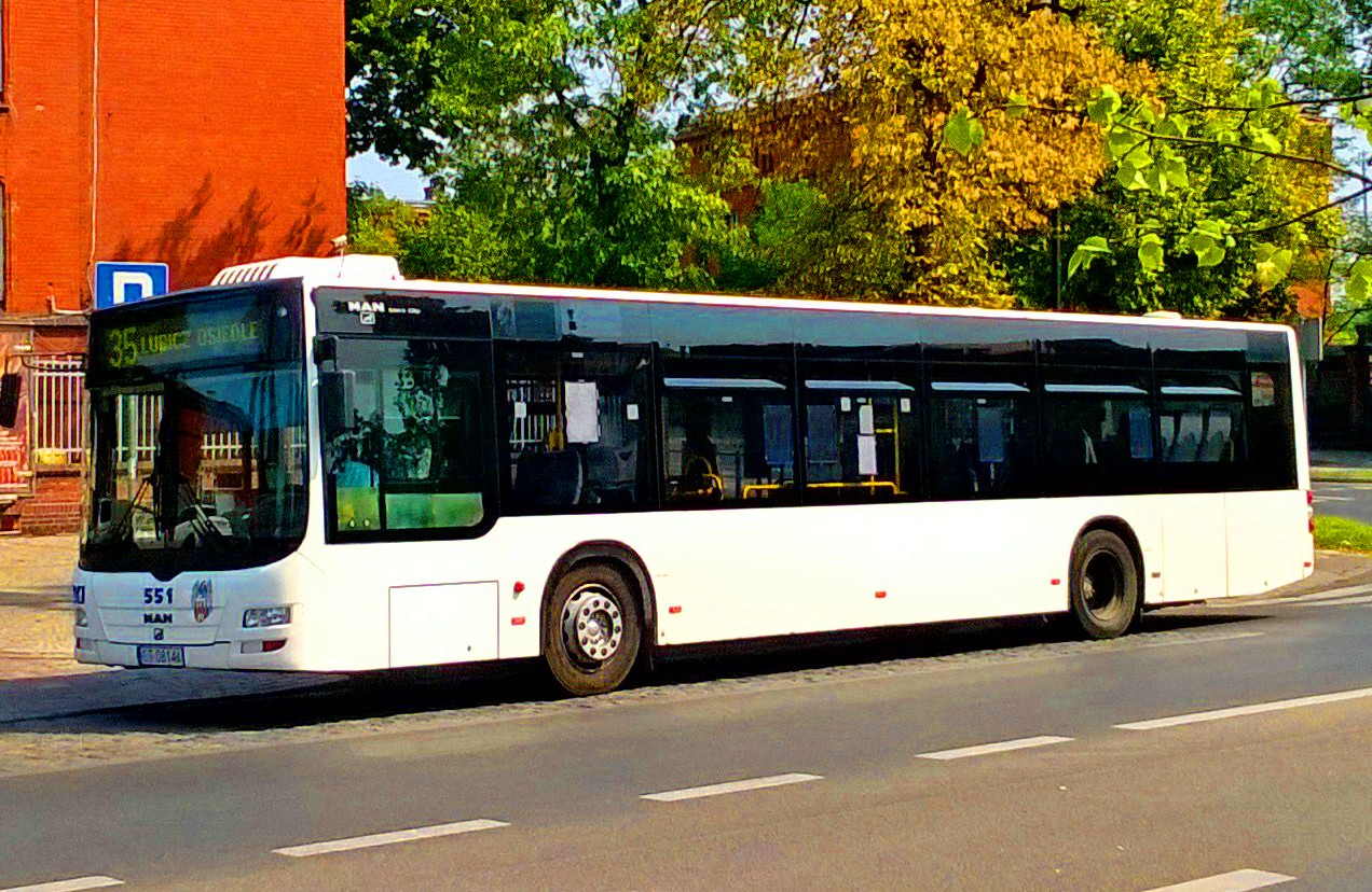 MAN NL273 w Toruniu